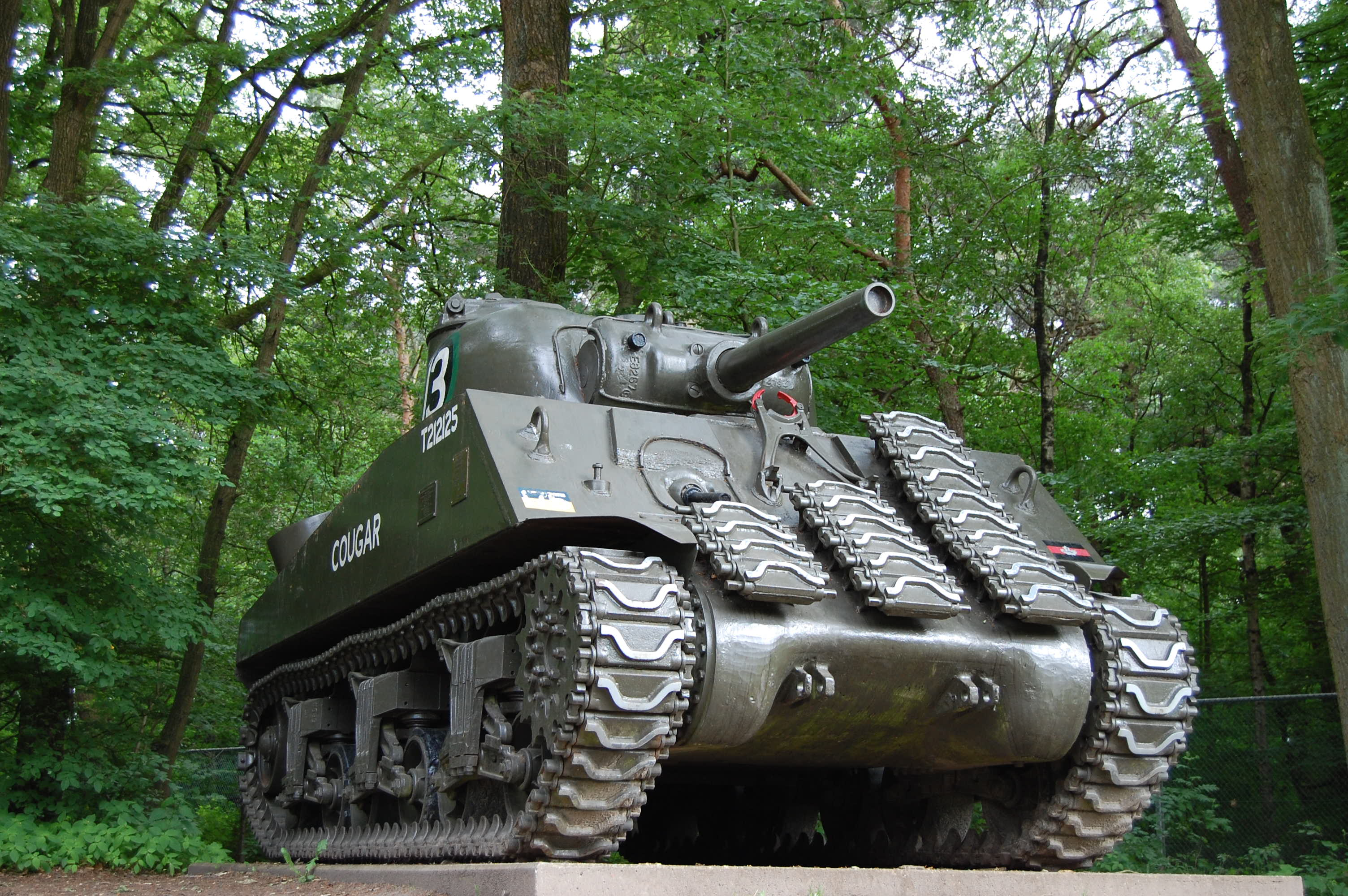 M4 Sherman tank, Arnhemseweg 120, 6711GP, Ede NL